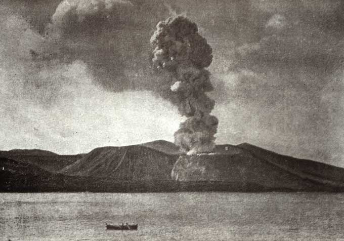 Vulcano Eruption 1890 Grossformat Das Bild ist über 70 Jahre alt und daher Public Domain.